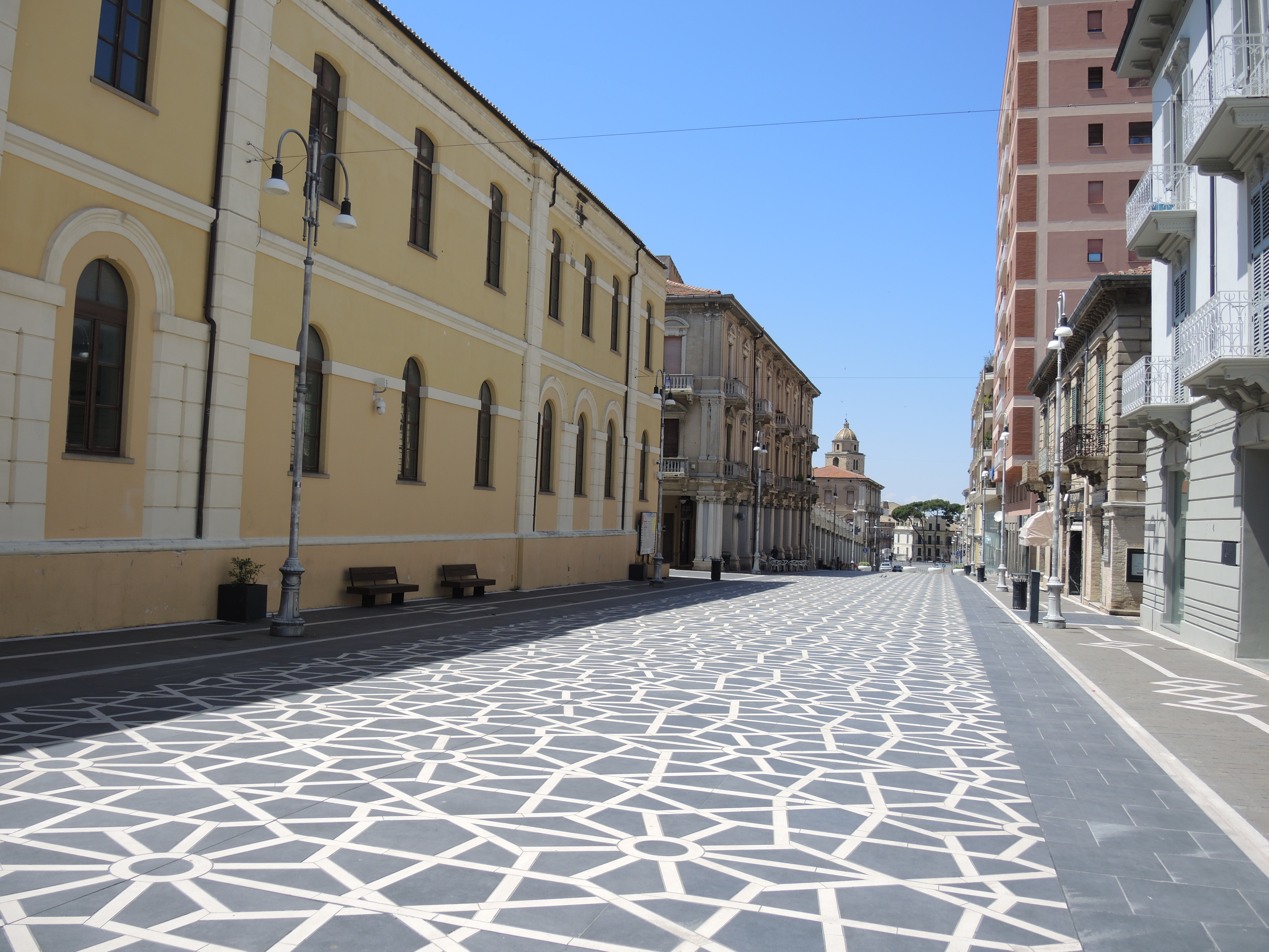 Lanciano